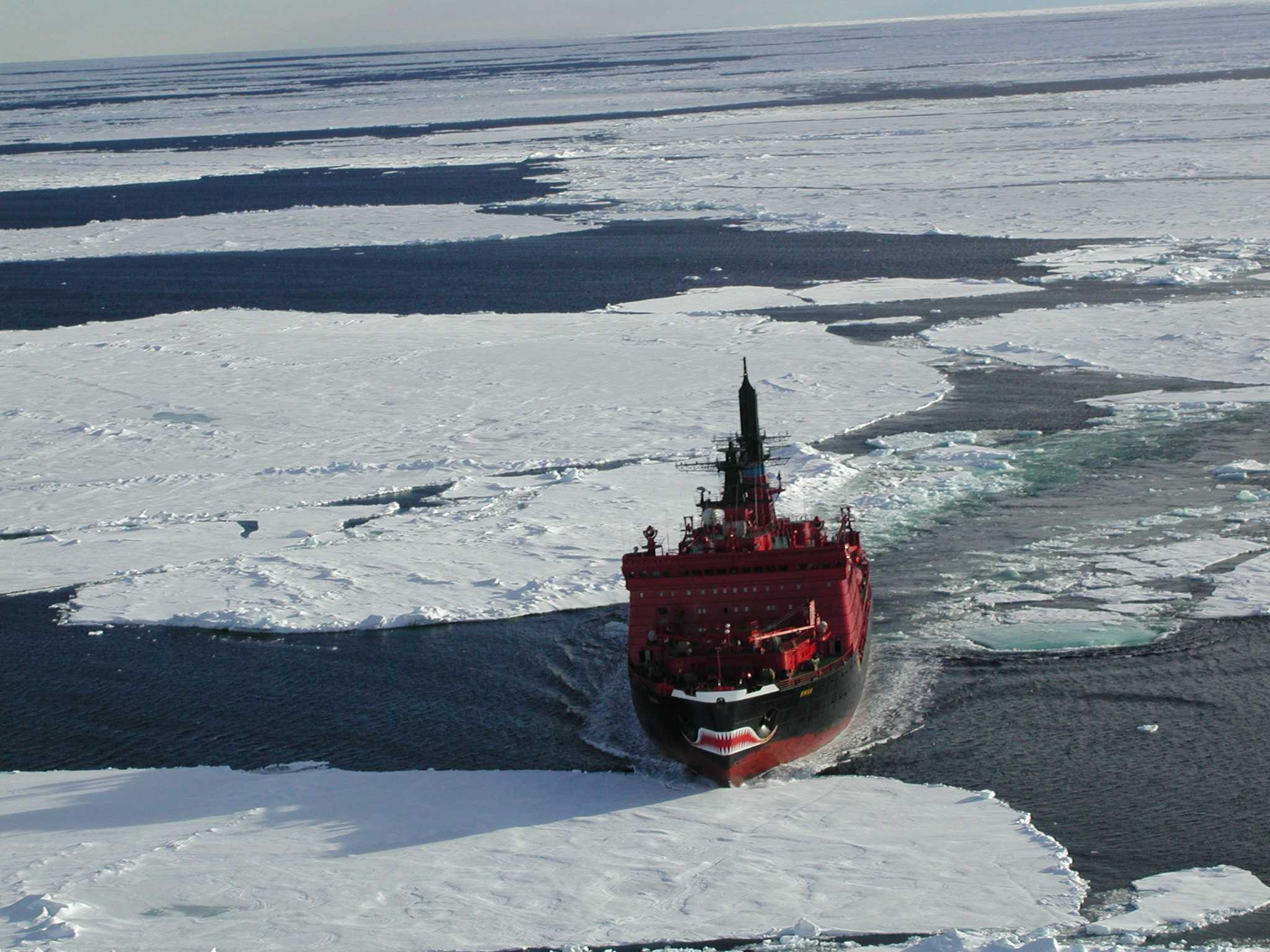 Атомный ледокол "Ямал". Вид с вертолёта.